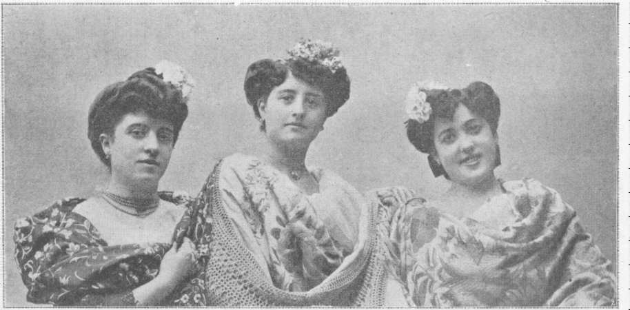 La Reine de Madrid, Concepcion Ledesma, au milieu, et ses deux demoiselles d'Honneur, Louise Mungira et Mathilde Gomez.